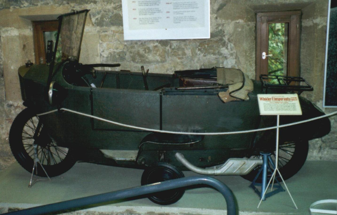 Winkler Einspur-Auto